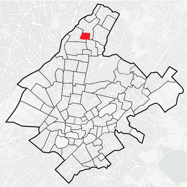 Περιοχή Κλωναρίδου